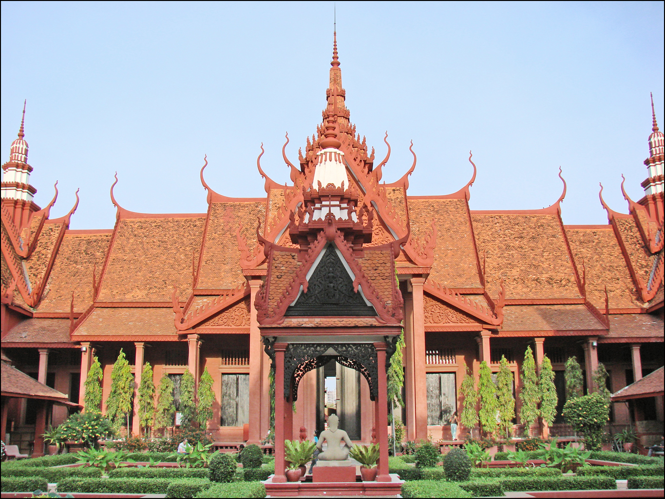 Le "Roi lépreux" (ici de dos) provient d'Angkor Thom, il date du XIIème siècle et est sculpté dans du grès gris beige. Il est placé dans la cour intérieure du musée où il est permis de photographier. "La célébrité de cette oeuvre est liée au mystère qu'elle inspire" (catalogue p180) Le corps est nu ce qui est inhabituel dans la statuaire khmer et son identification reste incertaine. Il pourrait s'agir de la figure de Yama, le dieu de la mort et le juge suprême. La monture de Yama est un buffle. Une tradition locale a assimilé cette statue au fondateur d'Angkor Vat : Bua-Sivisithiwong qui selon la légende était lépreux. Fondé par Georges GROSLIER , le musée a été inauguré le jour de l'an khmer 1920 sous le nom de Musée Albert Sarraut, par le roi Sisowat et le Résident Supérieur Baudoin, il est dédié à l'art khmer. Il est devenu en 1952 le musée national du Cambodge. voir le site de l'auteur réalisé en 2003